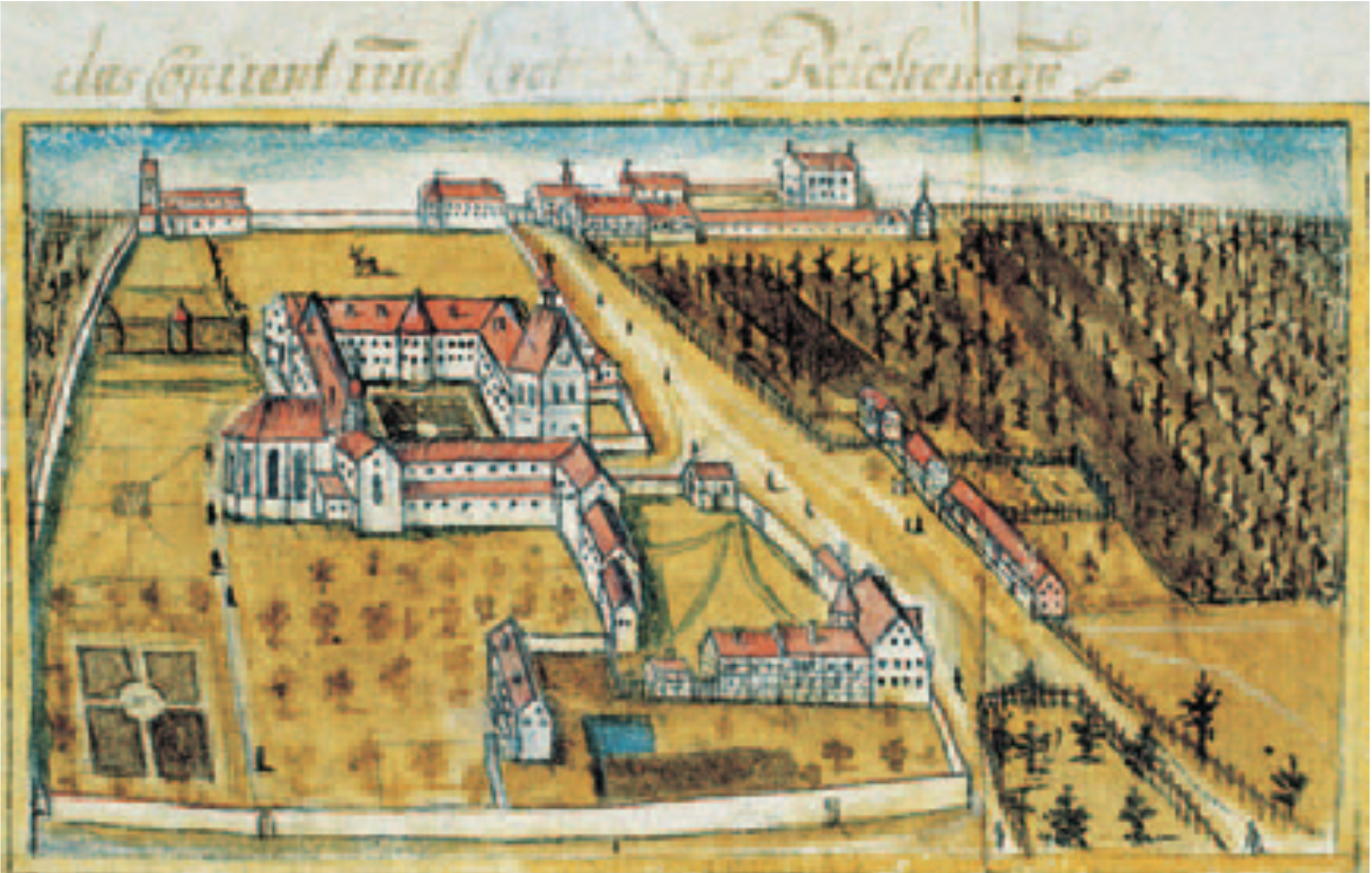 Klosterbezirk Mittelzell (von Norden), Insel Reichenau, Bodensee